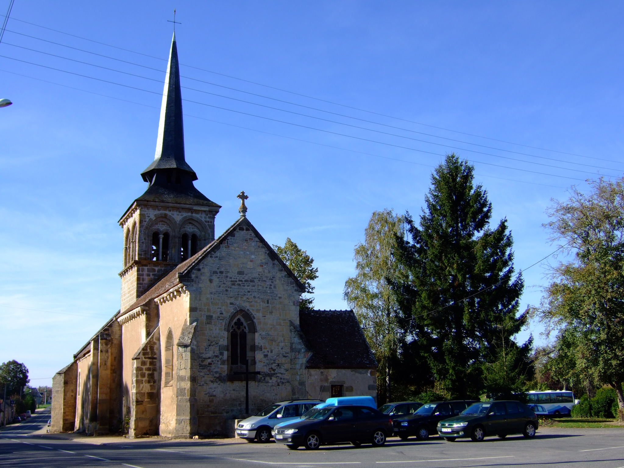 L'église de Loye-sur-Arnon - Photo amateur prise par moi-même.